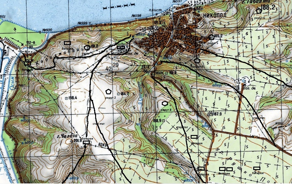 Карта на турските редути и батареи около Никопол по време на Руско-турската война 1877-1878 г.